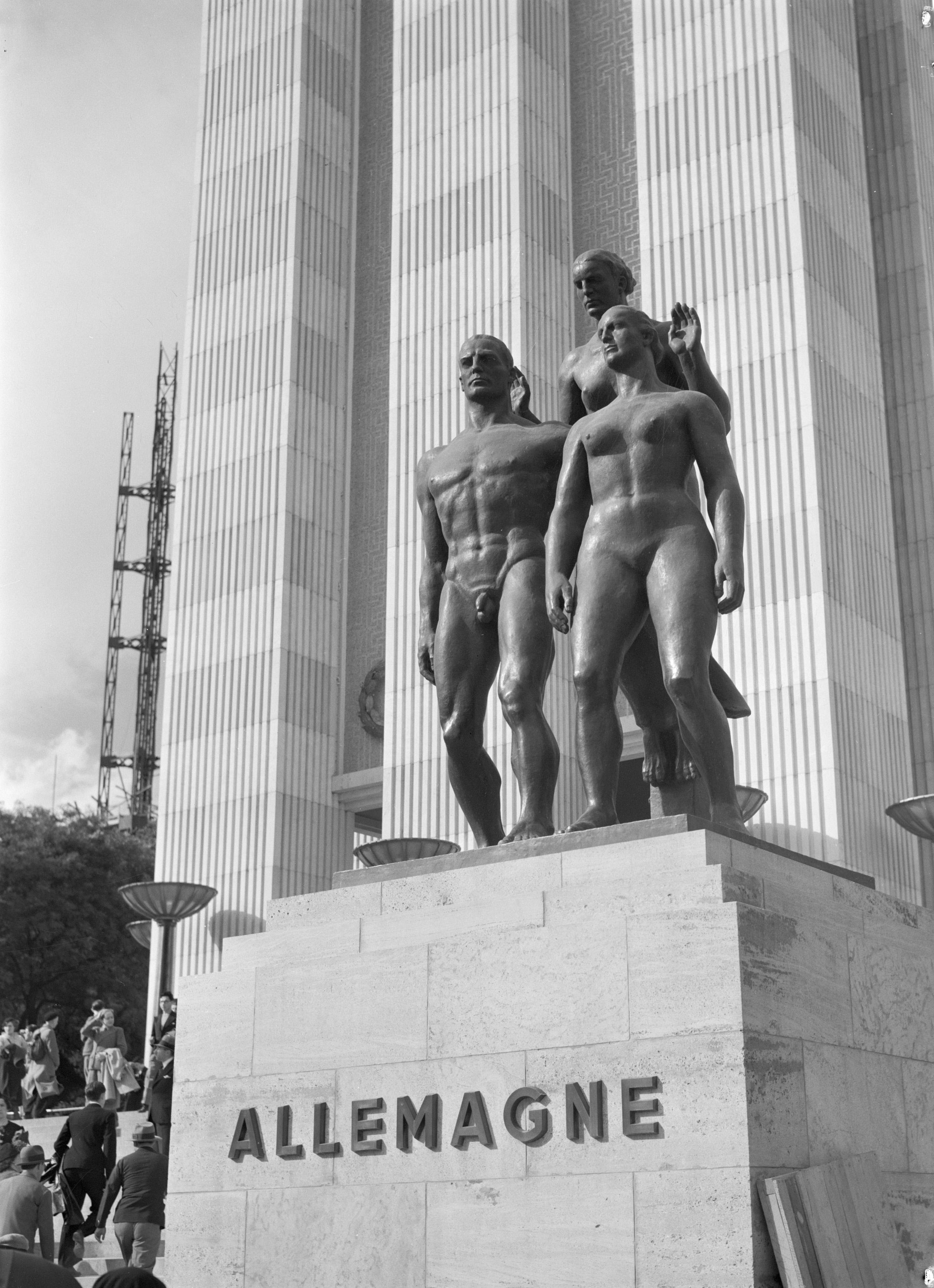 Collectie / Archief : Fotocollectie Van de Poll Reportage / Serie : Wereldtentoonstelling Parijs 1937 Beschrijving : Voorzijde van het Duitse paviljoen met een beeldengroep van Josef Thorak Datum : 1937 Locatie : Frankrijk, Parijs Trefwoorden : architectuur, beeldhouwwerken, wereldtentoonstellingen Persoonsnaam : Thorak, Josef Fotograaf : Poll, Willem van de, [onbekend] Auteursrechthebbende : Nationaal Archief Materiaalsoort : Negatief (6x6) Nummer archiefinventaris : bekijk toegang 2.24.14.02 Bestanddeelnummer : 254-2672